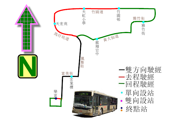 中文（香港）: 九巴7M線的走線圖